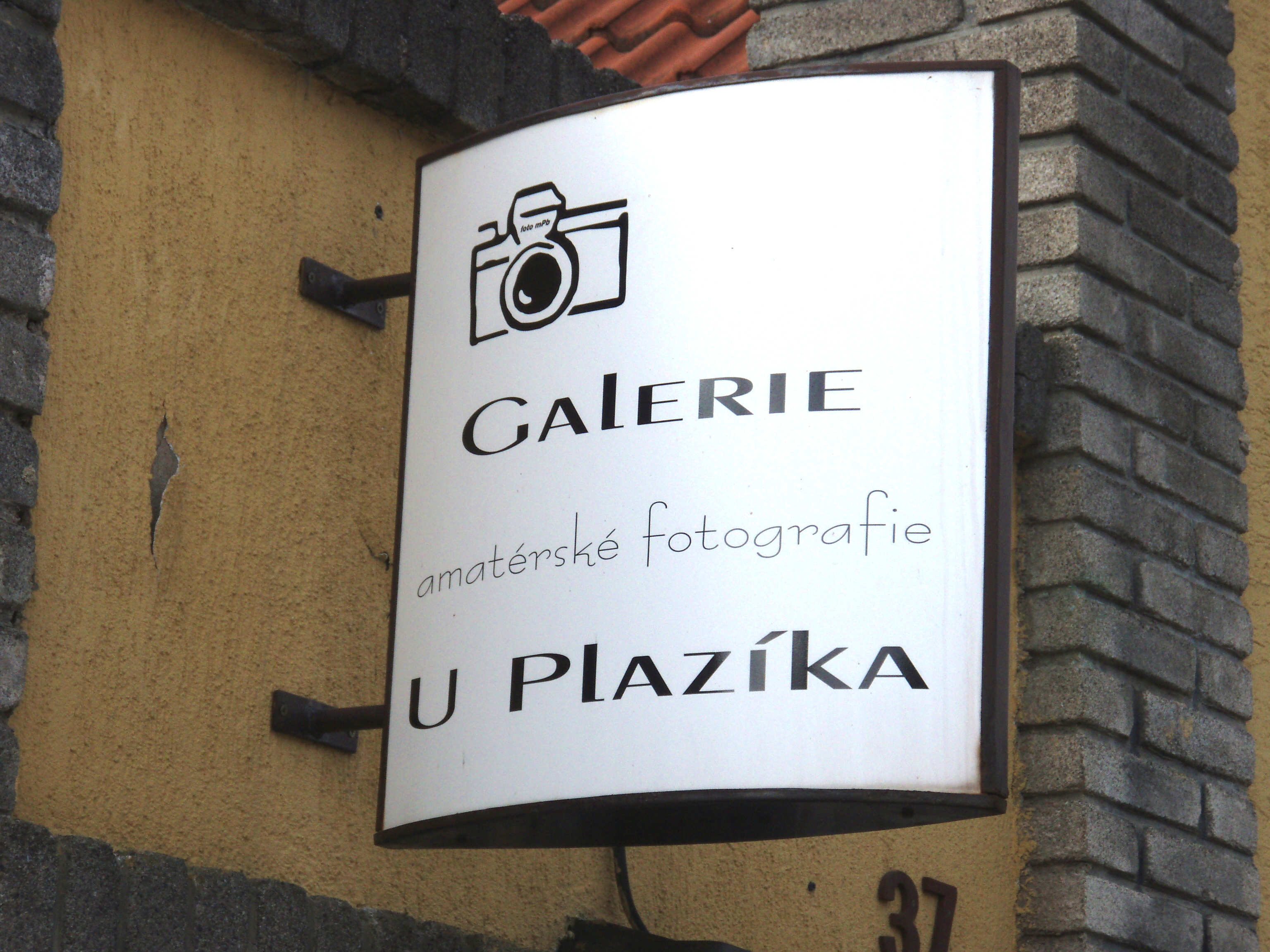 Informační tabule.